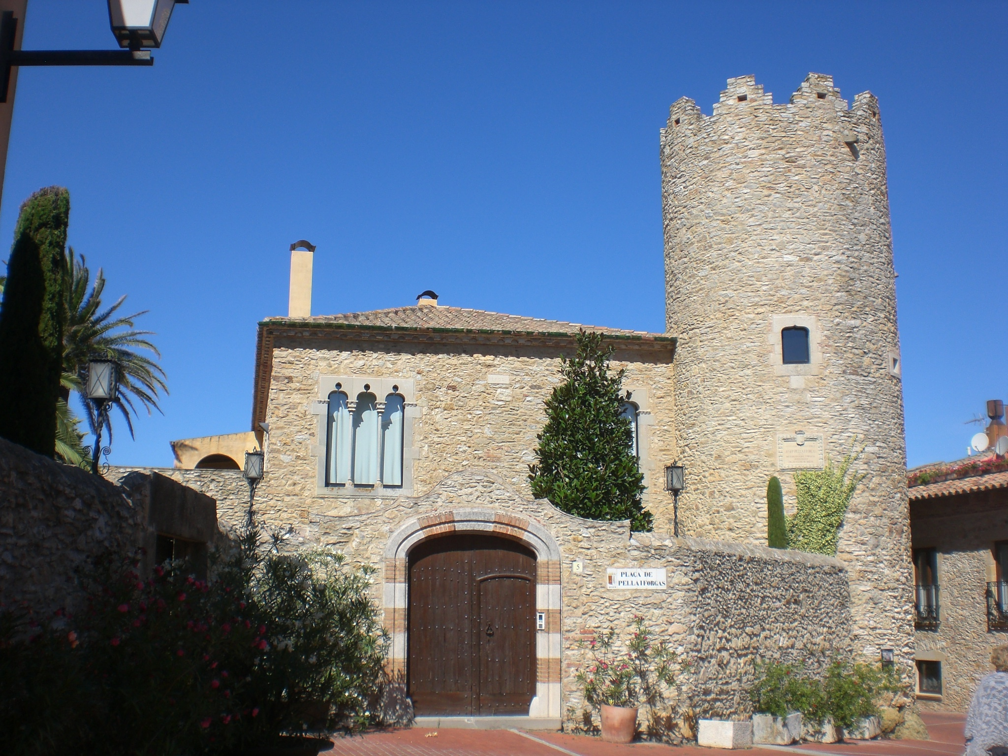 Torres de la vila: Can Pella i Forgas (Begur)